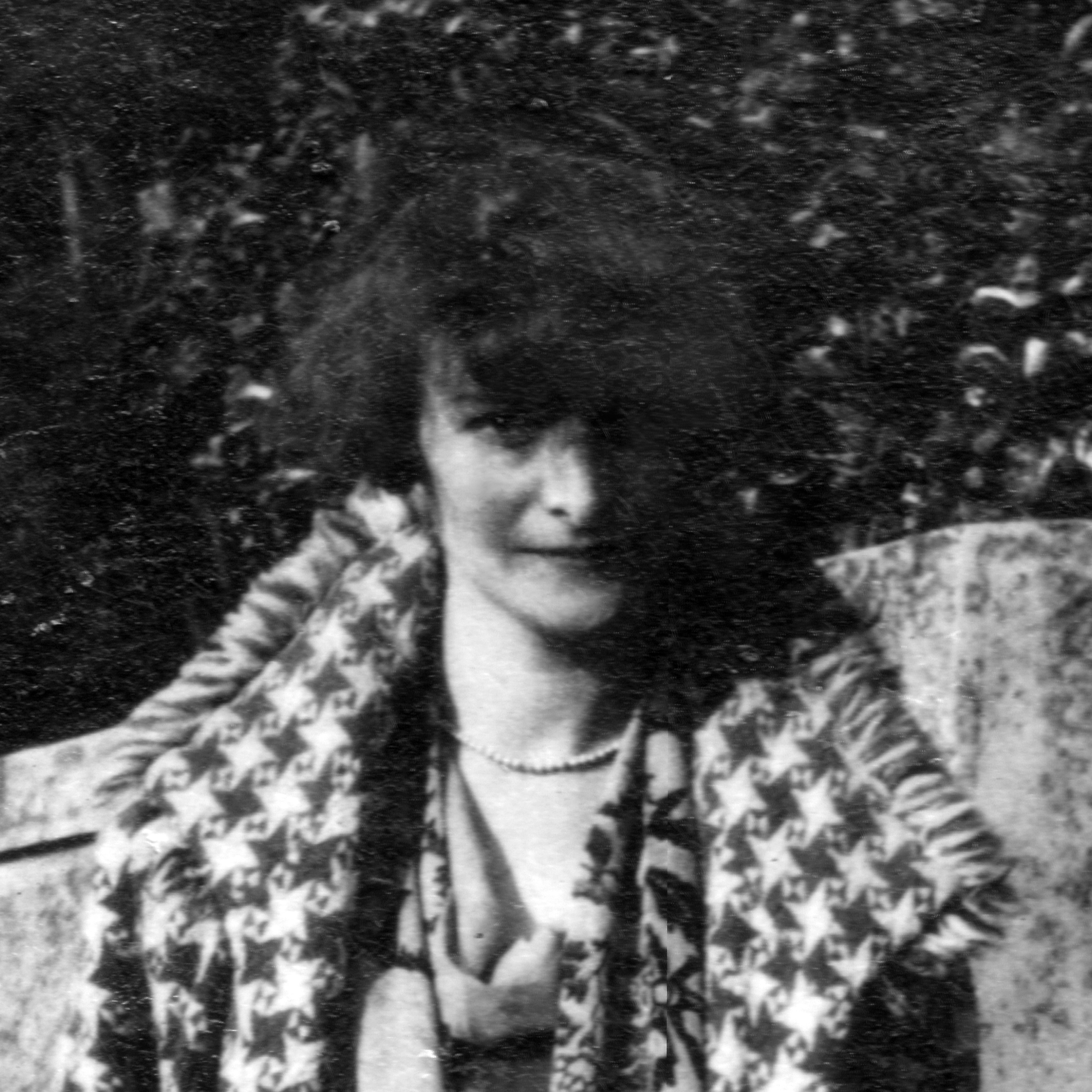 Dans une rue d Quimper, Plan rapproché